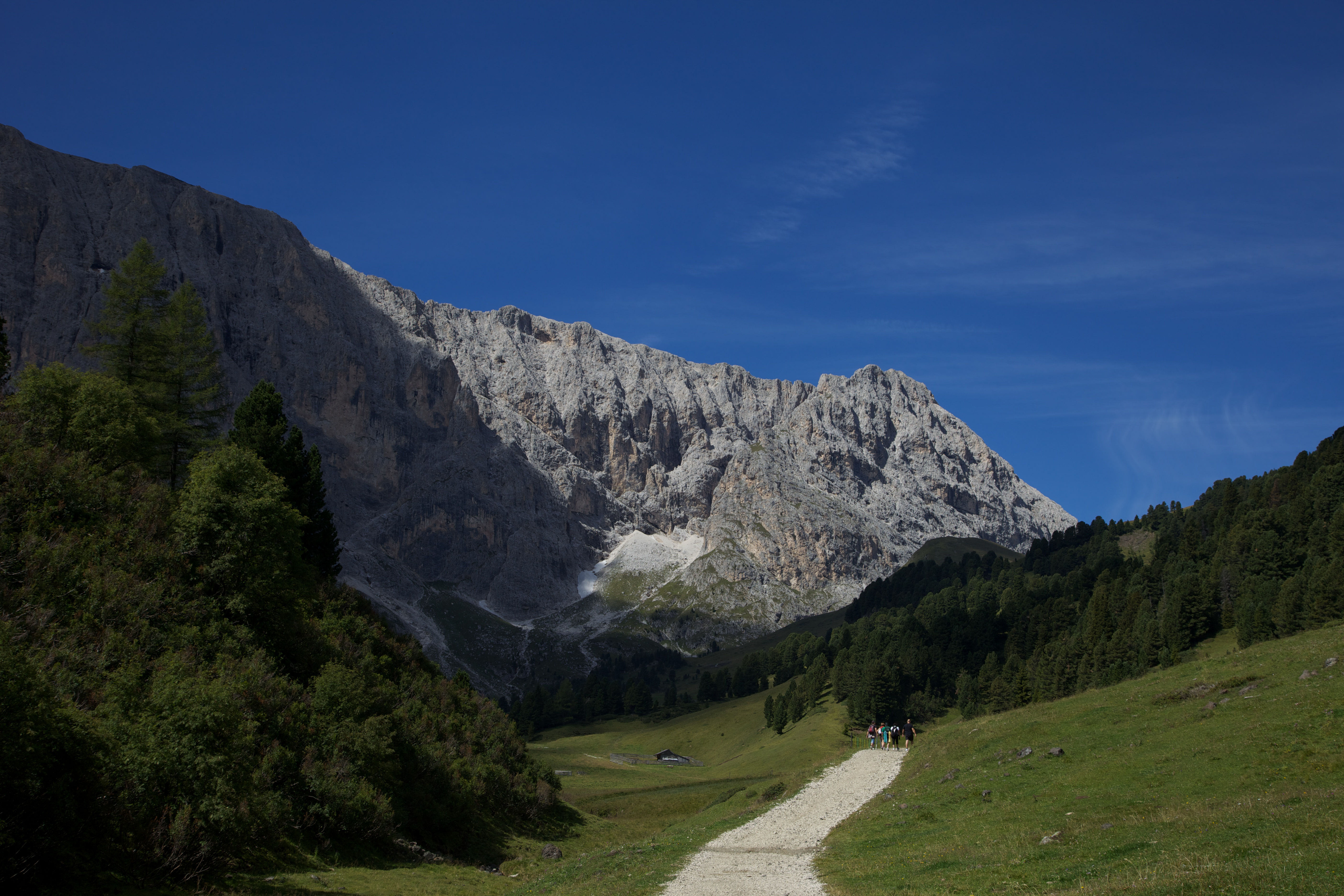 Blick zum Rosengarten am Ende des Val Duron